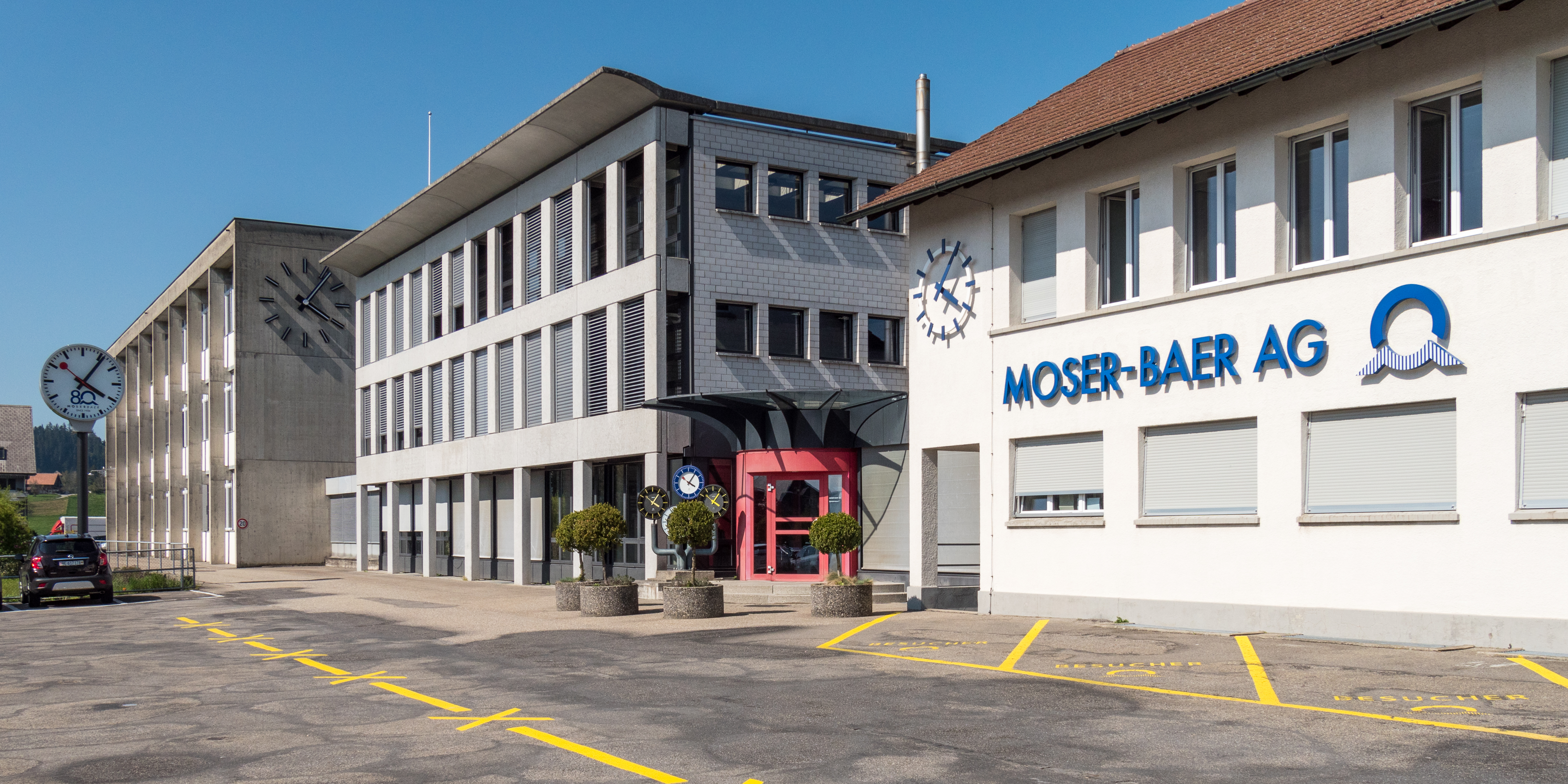 Moser-Baer AG (mobatime) in Sumiswald, Kanton Bern. Bedeutender Produzent von Bahnhofsuhren.